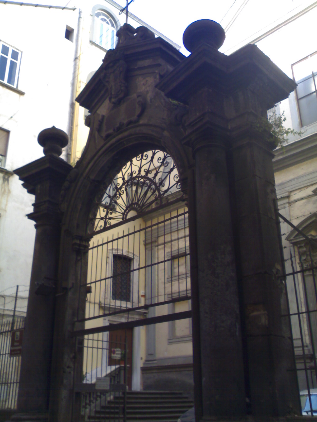 Portale in piperno di Santa Maria di Monteverginella.